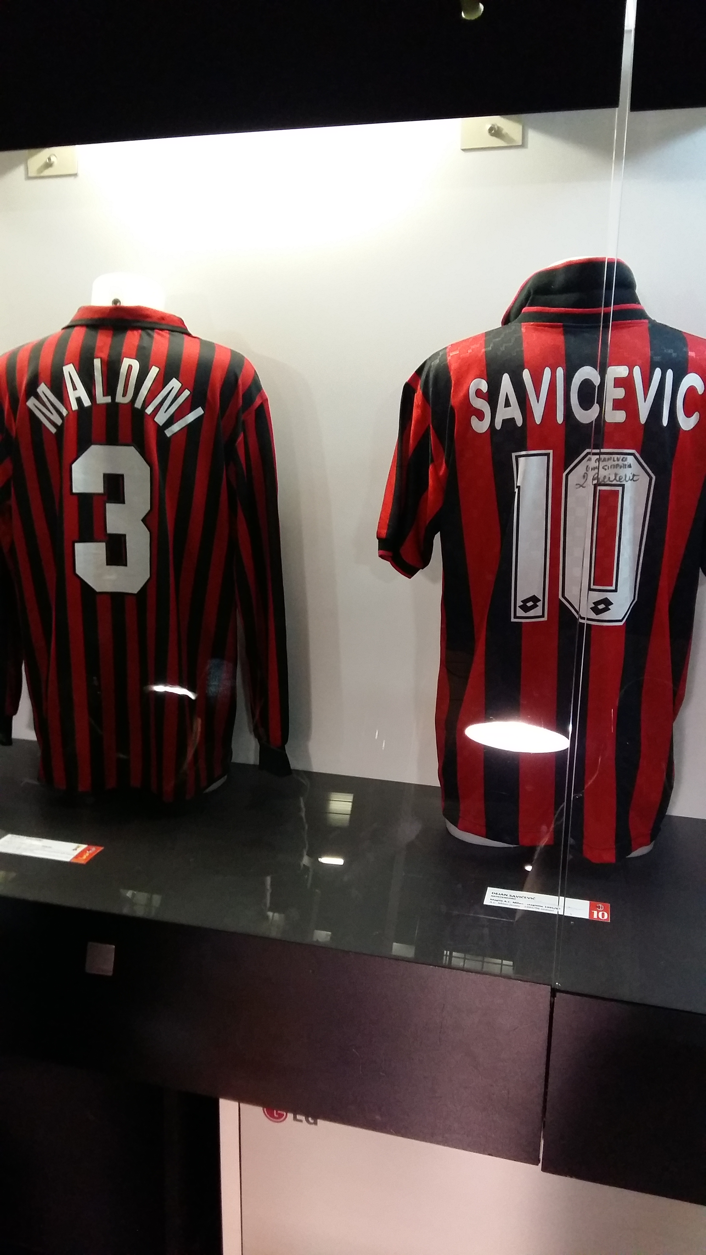 Футболки Паоло Мальдини и Деяна Савичевича в музее Сан-Сиро.